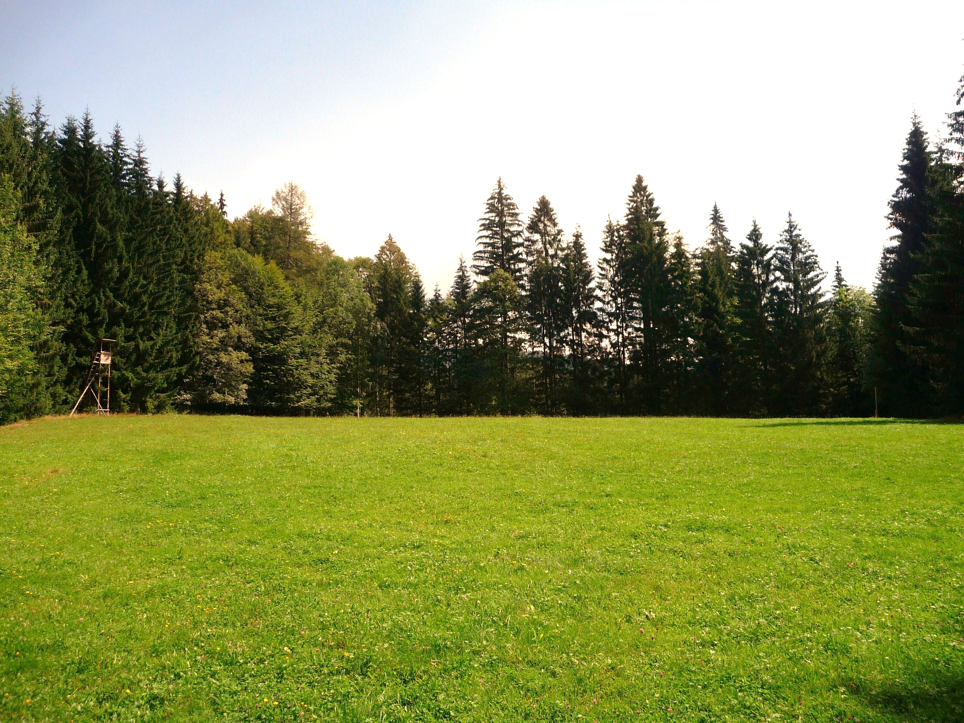 Der Totenschädel, ein Schachten im Bayerischen Wald